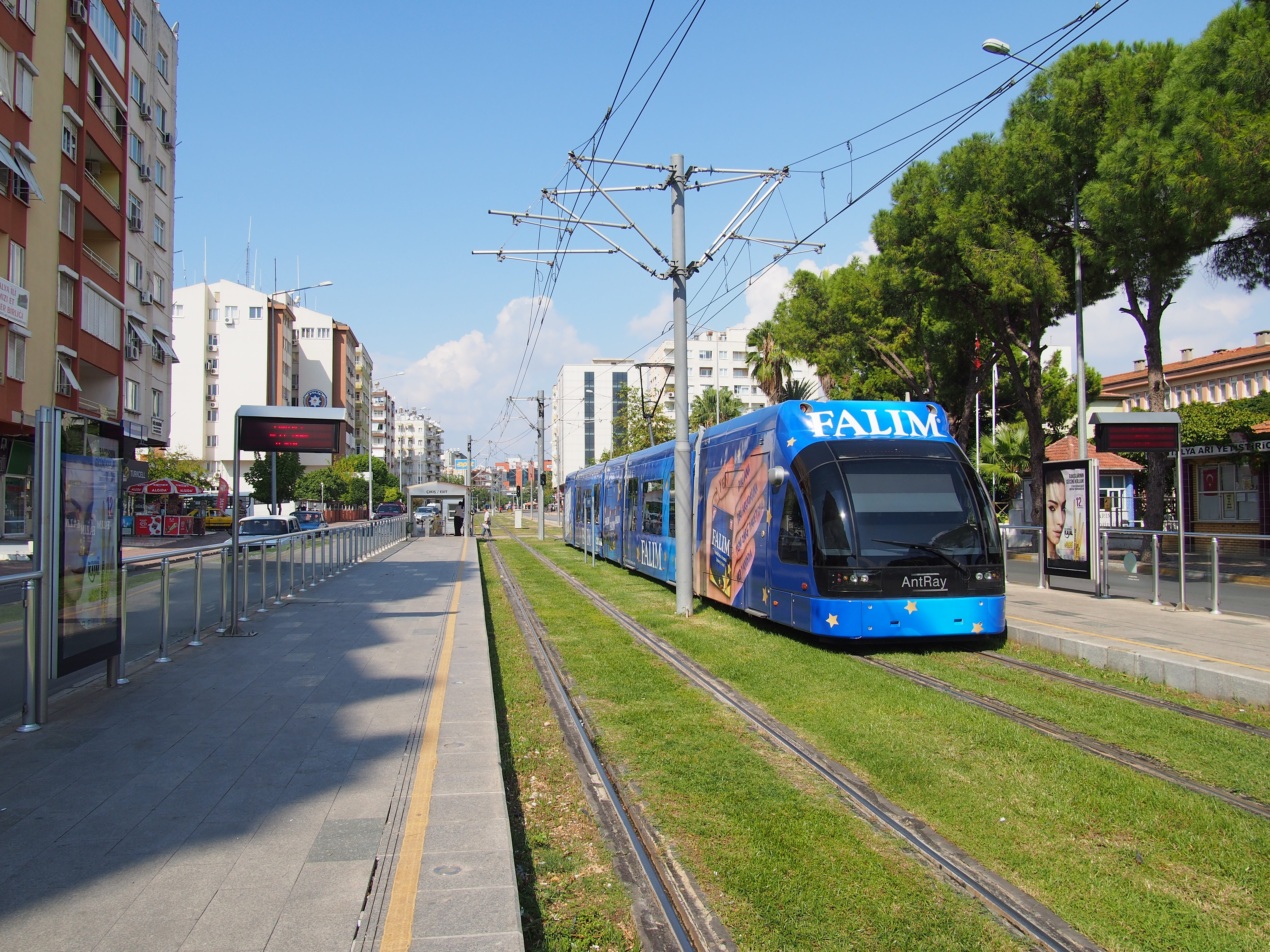 Antalya Tram - 2014.10